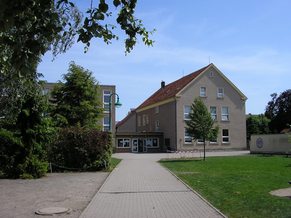 Mittelschule Malschwitz